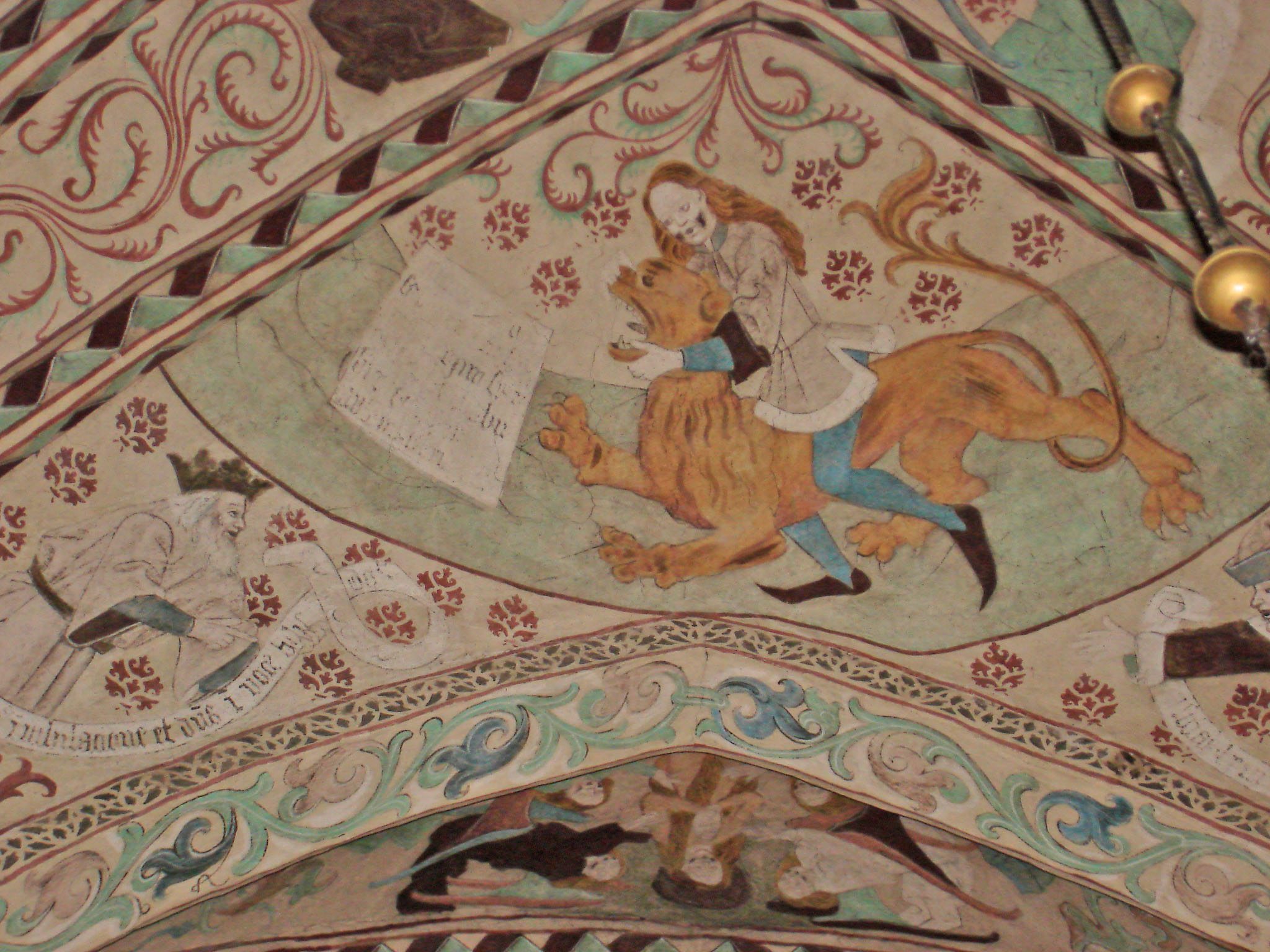 Fotat av församlingsmedlem (tompen0000), 2006.